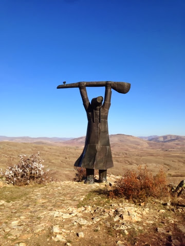 Pir Sultan Abdal'ın yaşadığı Banaz köyü Yıldızeli, Sivas ve Pir Sultan evi-türbesi.